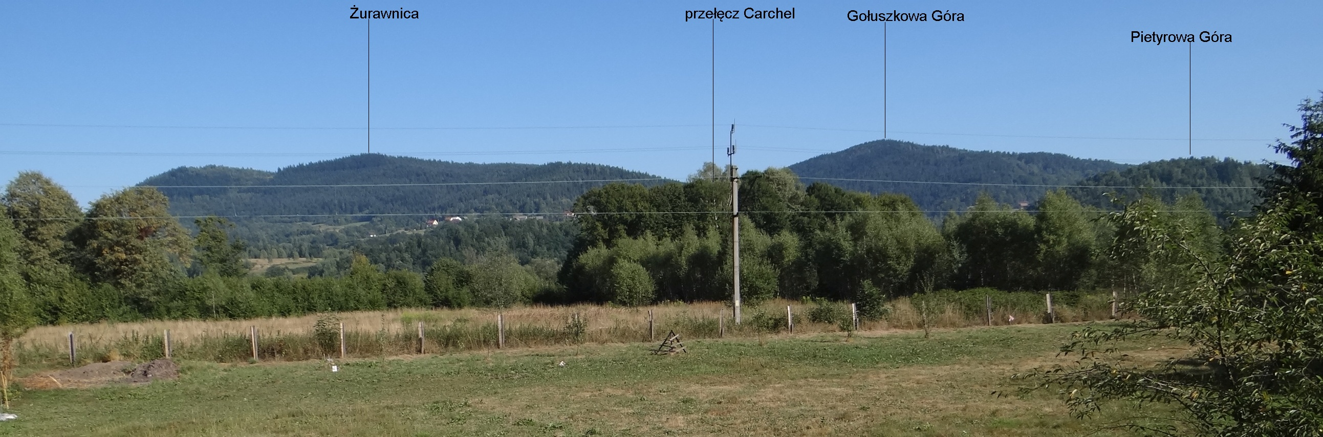 Widok ze Stryszawy: Od lewej: Żurawnica, przełęcz Carchel, Gołuszkowa Góra, Pietyrowa Góra